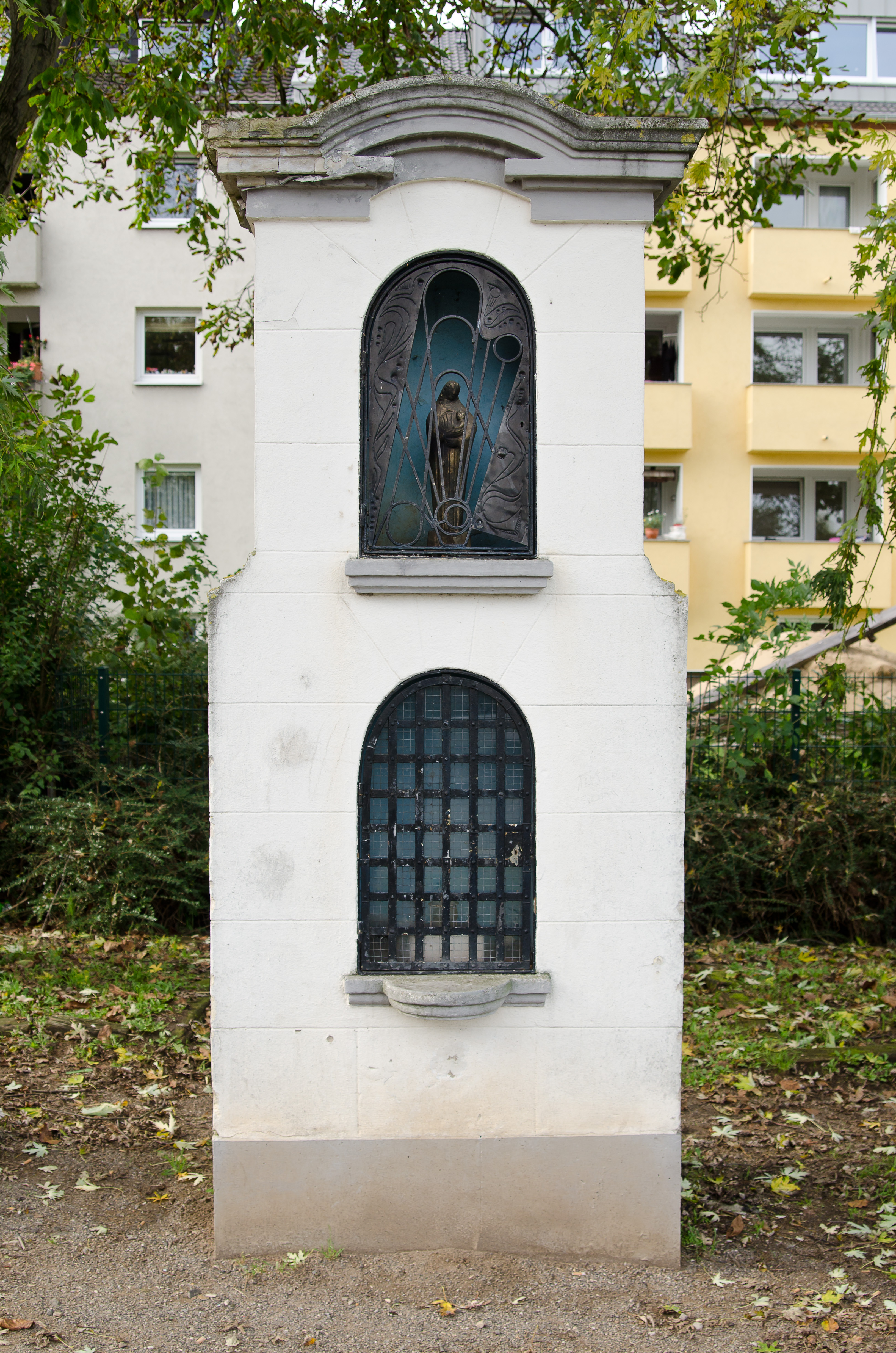 Kleindenkmal (Bildstock), Am Bilderstöckchen o. Nr. Erkennbare Beschädigungen am GiebelThis is a photograph of an architectural monument.